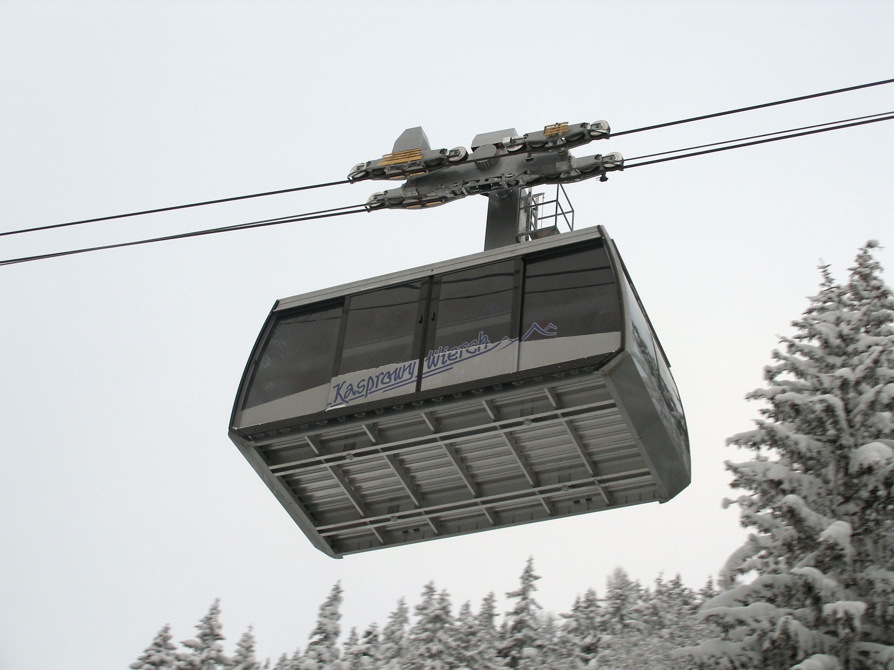 Nowy wagonik KL Kasprowy Wierch